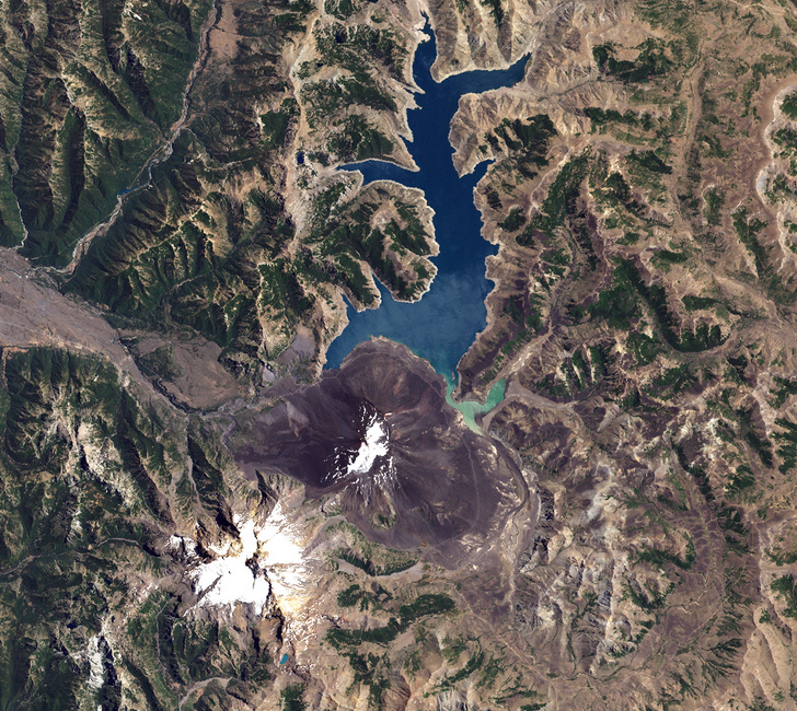 Imagen del volcán Antuco, junto a la laguna del Laja y el volcán Sierra Velluda, tomada por el satélite Landsat 7